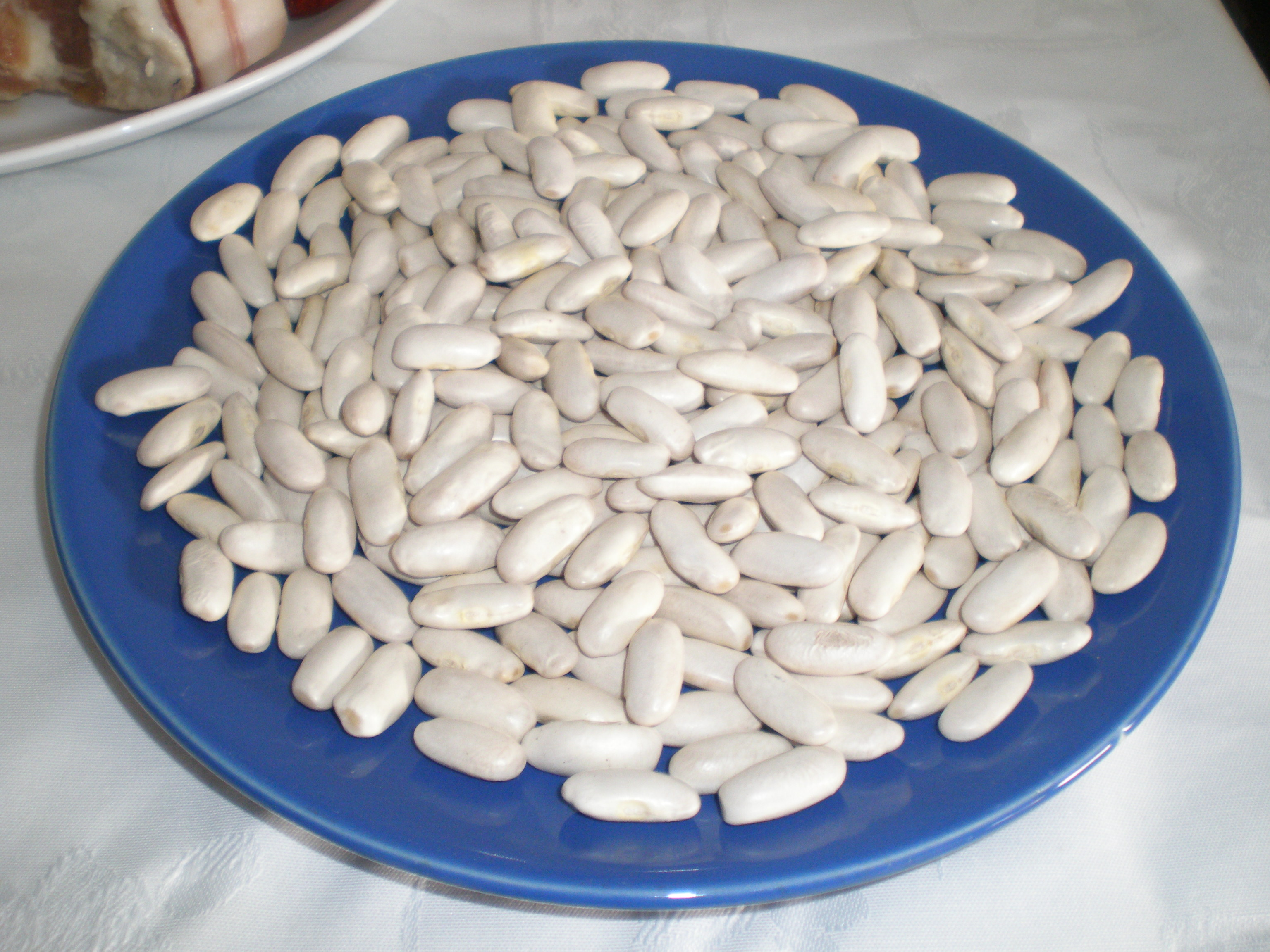 Faba asturiana del Consejo Regulador de Denominación Específica